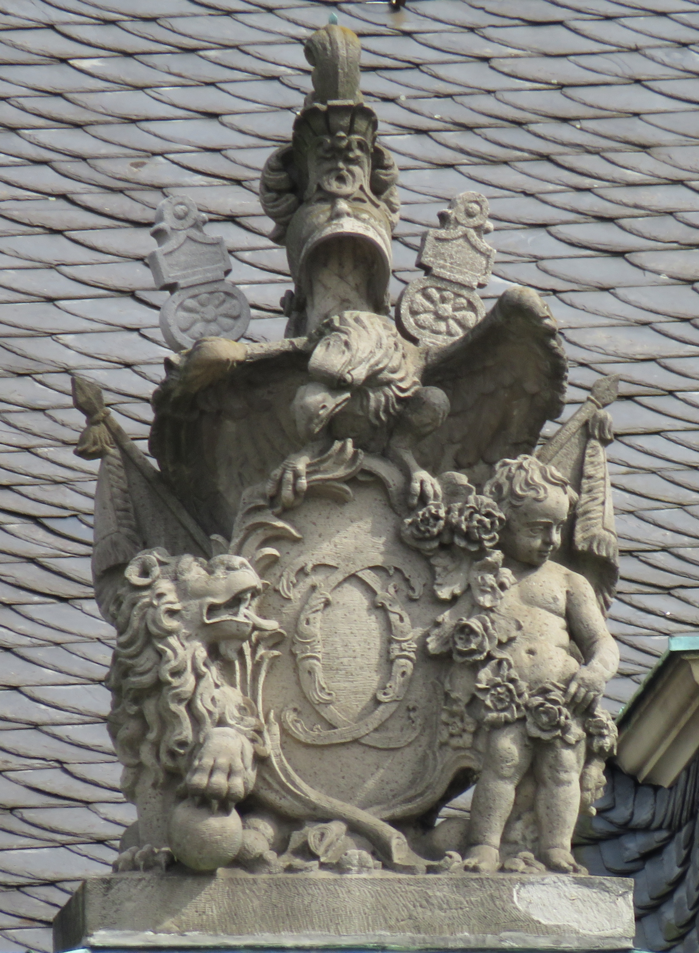 Neues Schloss Stuttgart, Dachfigur.